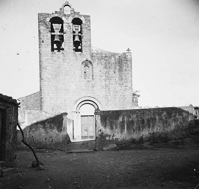 Façana i campanar de l ' església romànica de Santa Maria de la Tallada d ' Empordà . Destaca el rellotge de la torre del campanar de la mateixa .